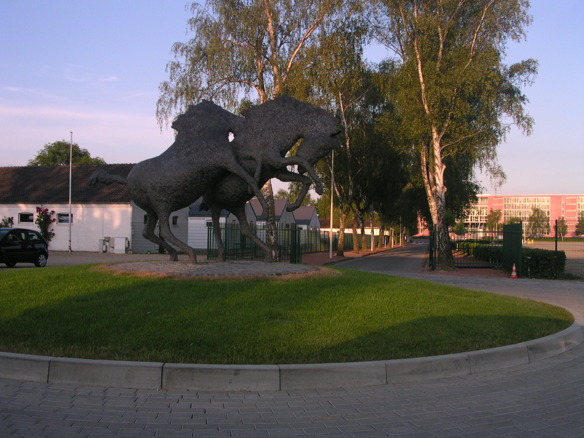 Aachen Skulptur zweier Pferde vor dem Reitsportgelände